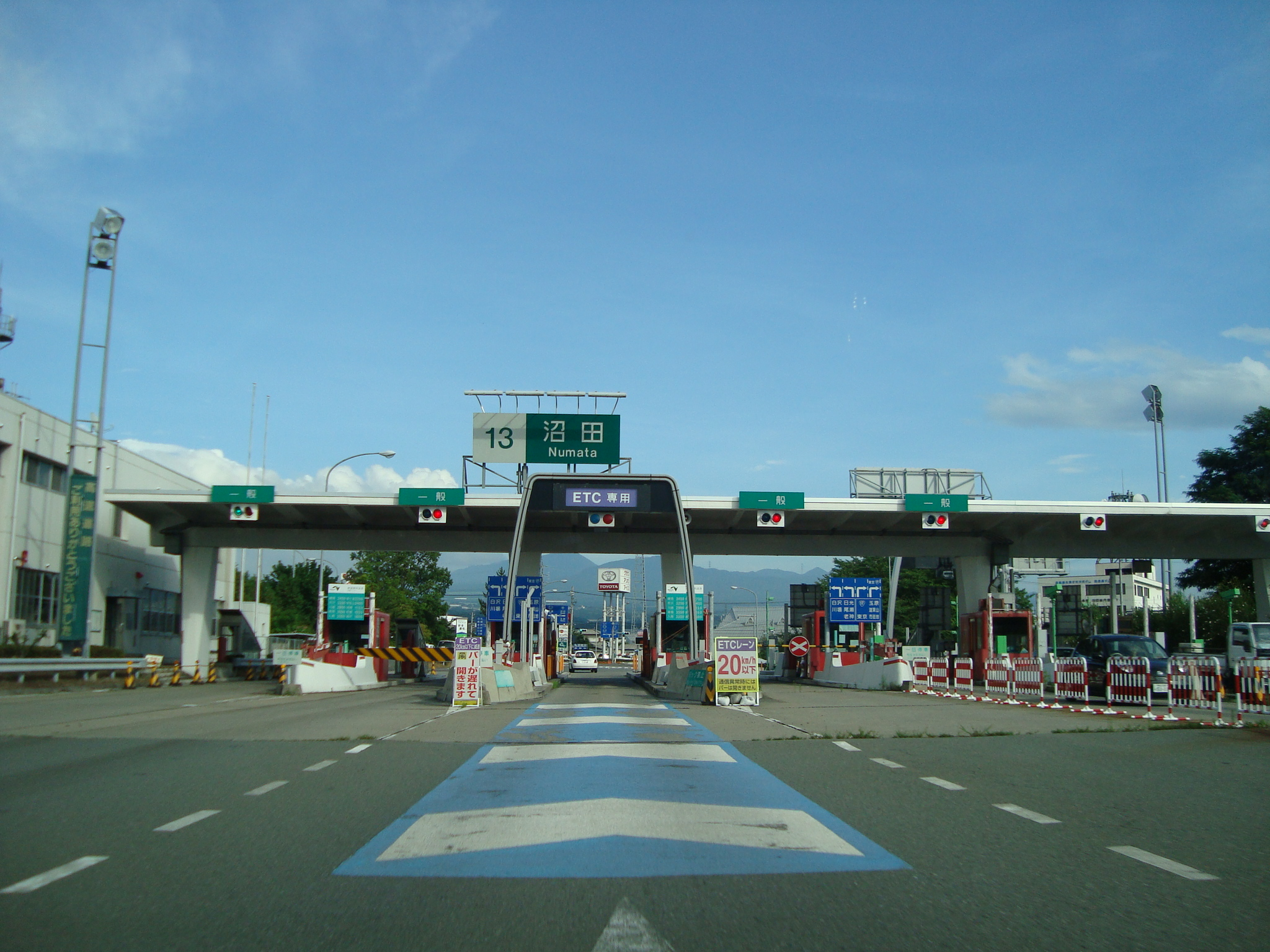 関越自動車道 沼田インターチェンジ 料金所 群馬県沼田市